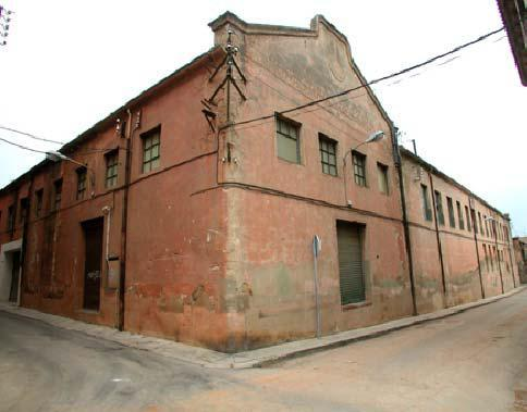 Bòbila Vella de Palafrugell